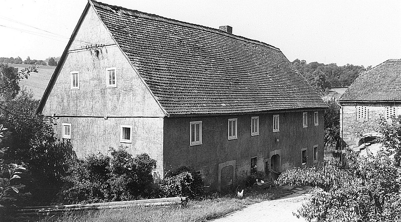 Original image description from the Deutsche Fotothek Kubschütz-Soritz. Ehem. Mühle